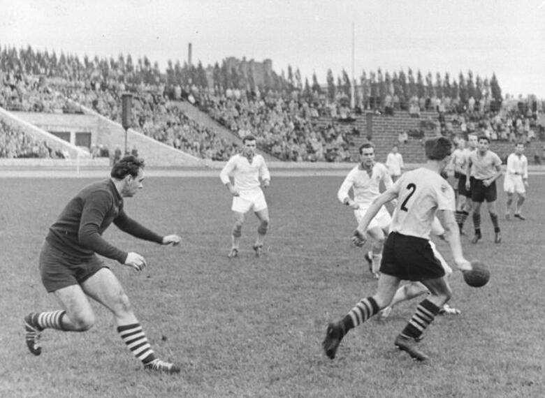 Zentralbild-Zastrow Za-Ku 19.10.1958 Fußballspiel ASK Vorwärts Berlin gegen SC Aktivist Brieske-Senftenberg - Am 19.10.58 konnte ASK-Vorwärts den SC Aktivist Brieske-Senftenberg 2:0 besiegen. Das Spiel wurde in Berlin ausgetragen. UBz.: Vor dem Tor von Aktivist bringen die ASK-Stürmer die Verteidigung von Brieske und den Torsteher Jünemann in starke Bedrängnis.